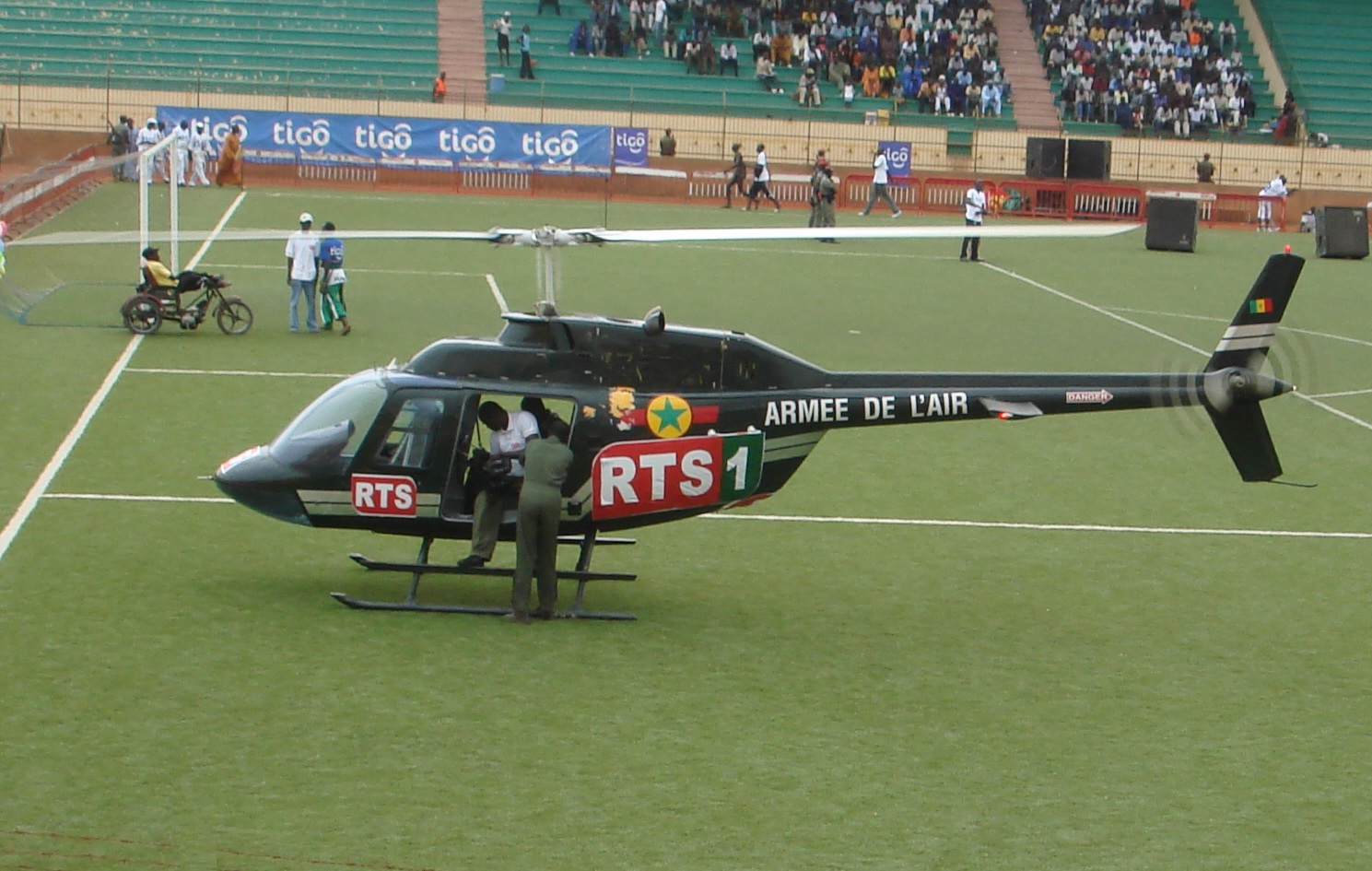 Hélicoptère Bell 206 de l'Armée de l'air sénégalaise.